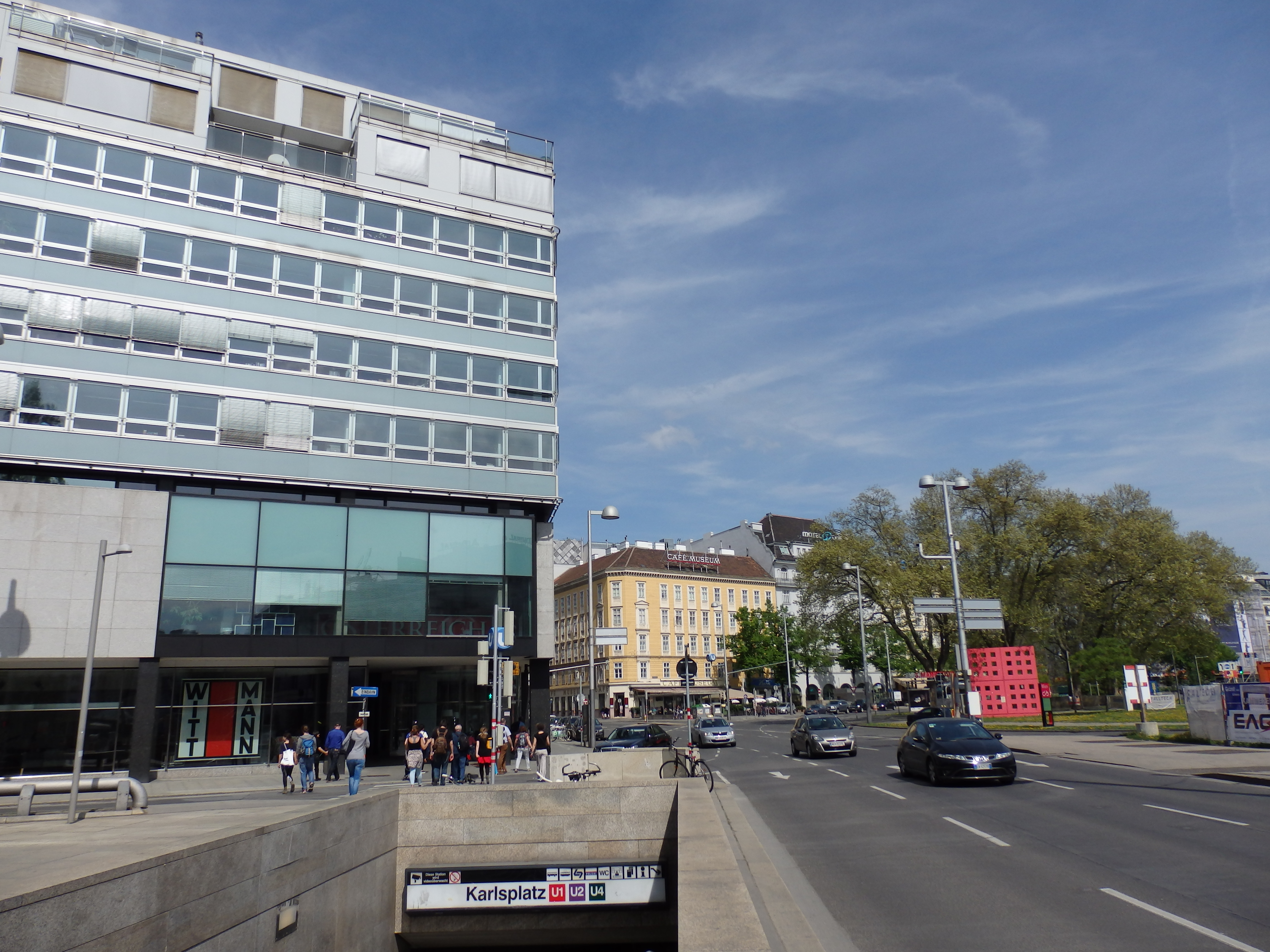 Friedrichstraße von der Secession nach Osten, Wien-Innere Stadt